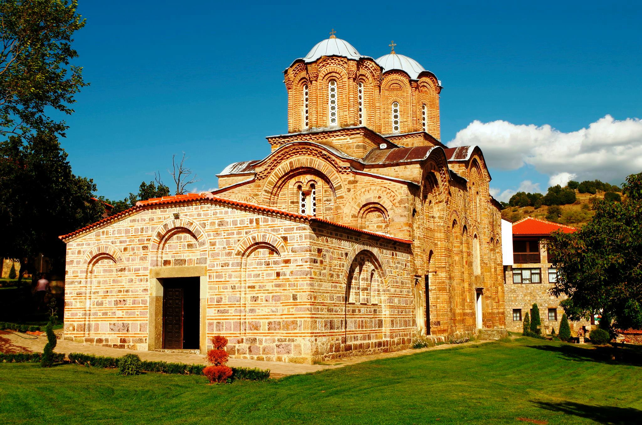 Црквата Св. Архангел Михаил е дел од „Лесновскиот манастир“